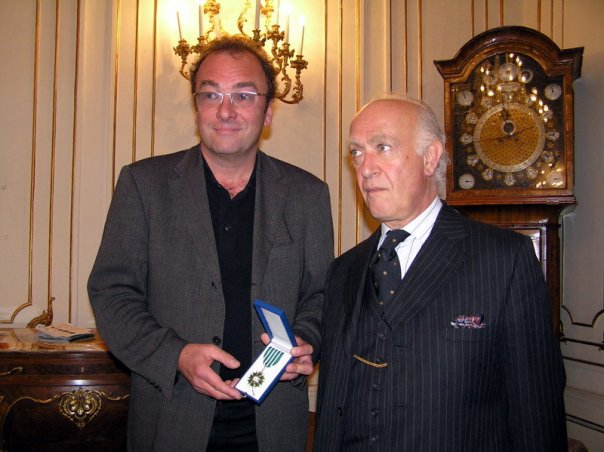 Ernennung zum Chevalier des arts et lettres, 2009